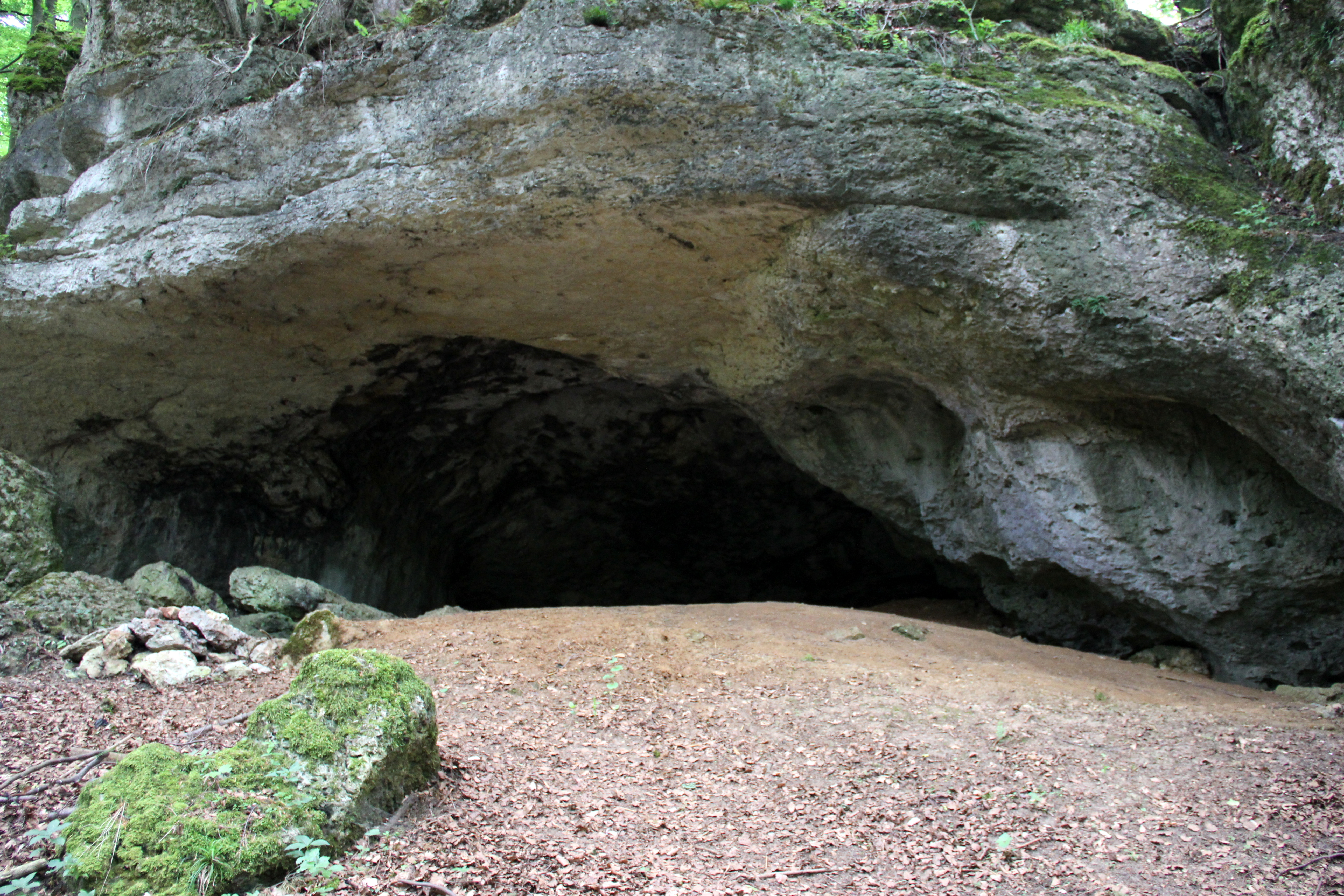 Michelhöhle, Eingang